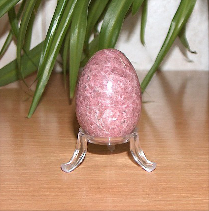 rodonit, autor zdjęcia Grzegorz Framski, 15.10.2006 r.